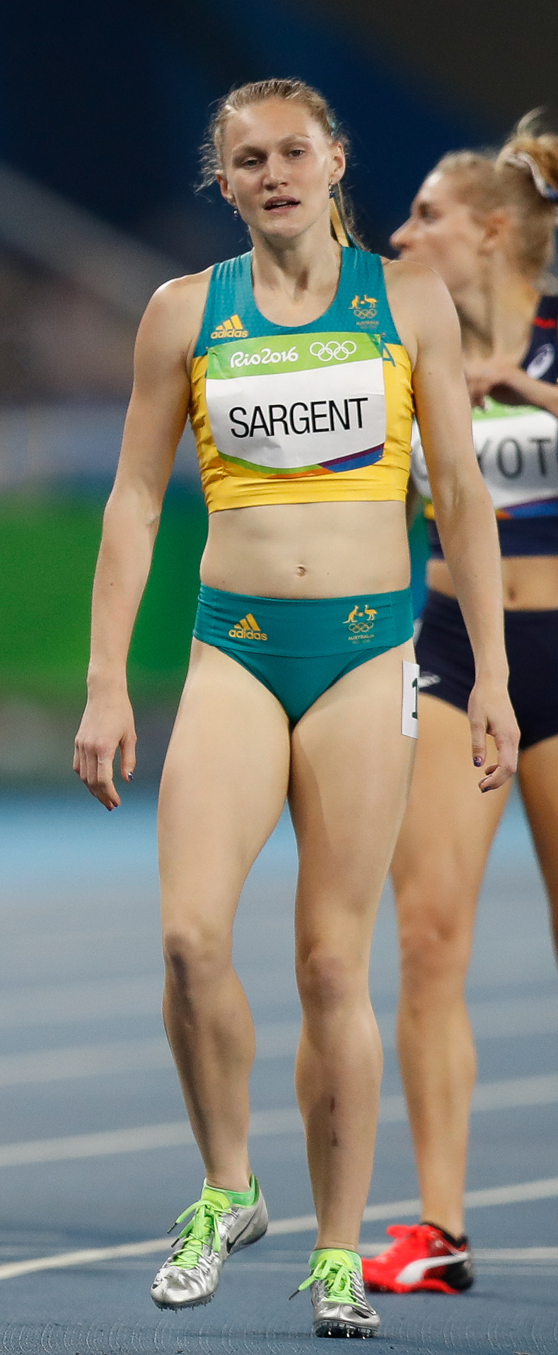 Rio de Janeiro - Eliminatórias do revezamento 4 x 400m nos Jogos Rio 2016, no Estádio Olímpico